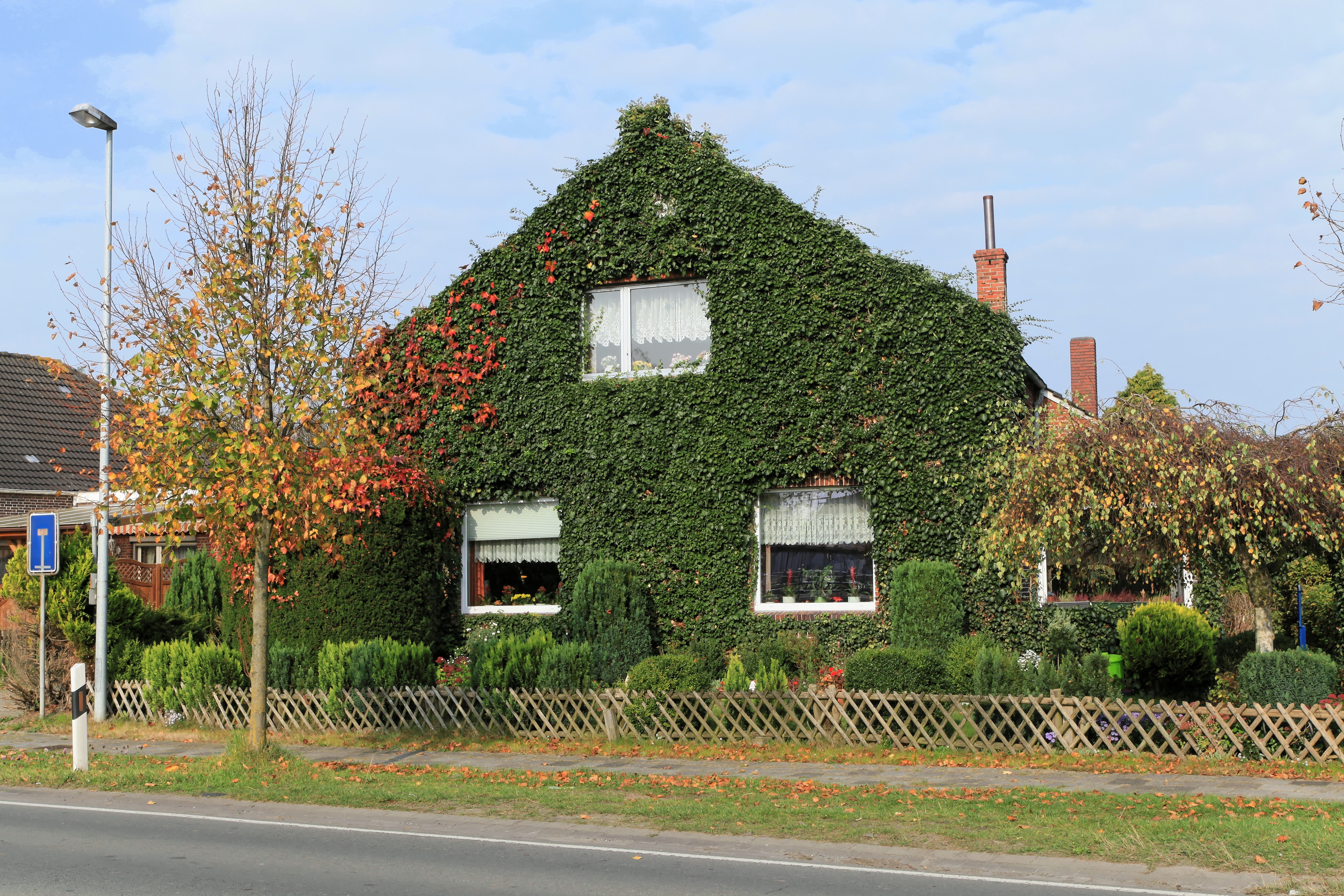 Kommerzienrat-Hesse-Straße in Weener